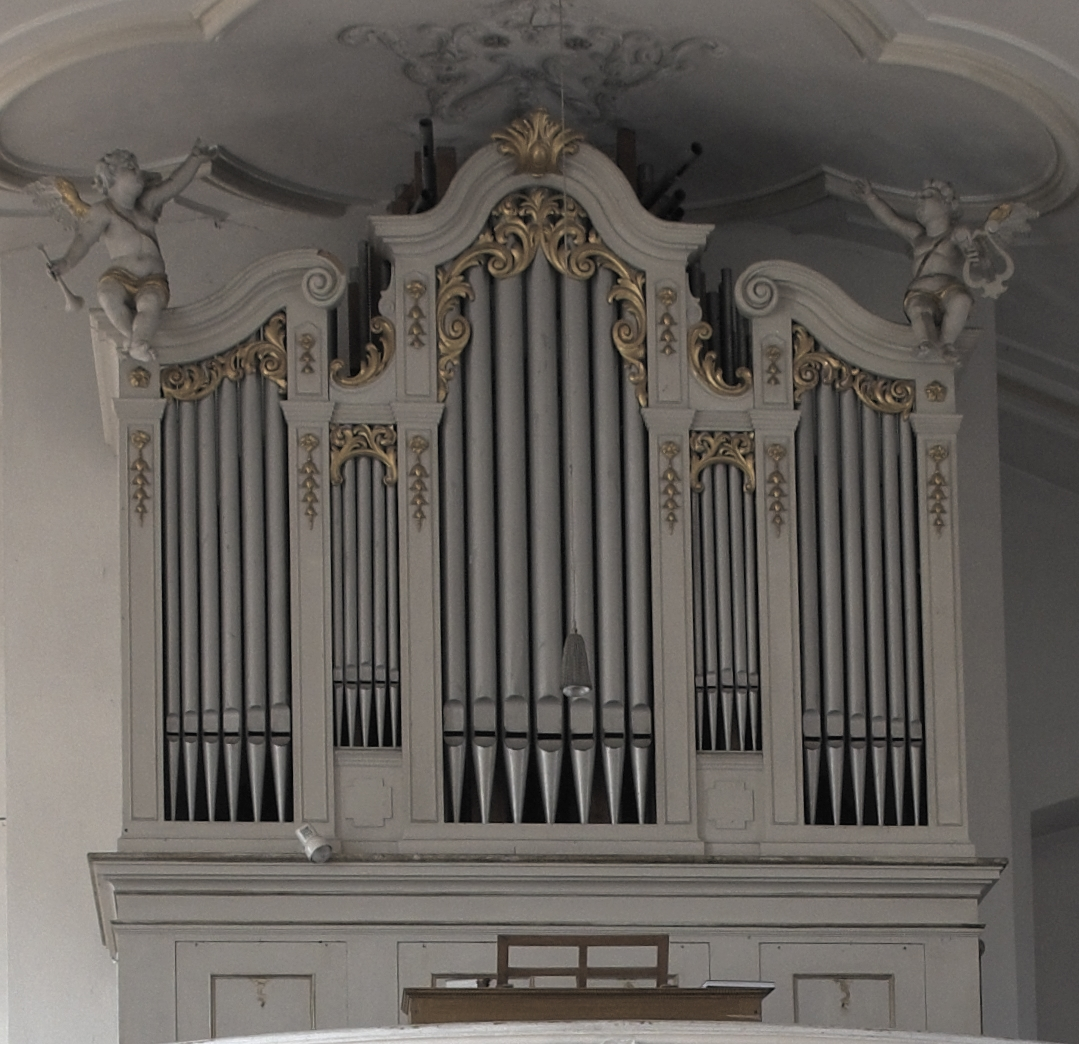 Katholische Filialkirche St. Maria, ehemalige Wallfahrtskirche, in St. Heinrich, einem Ortsteil von Münsing im Landkreis Bad Tölz-Wolfratshausen (Bayern/Deutschland), Innenraum